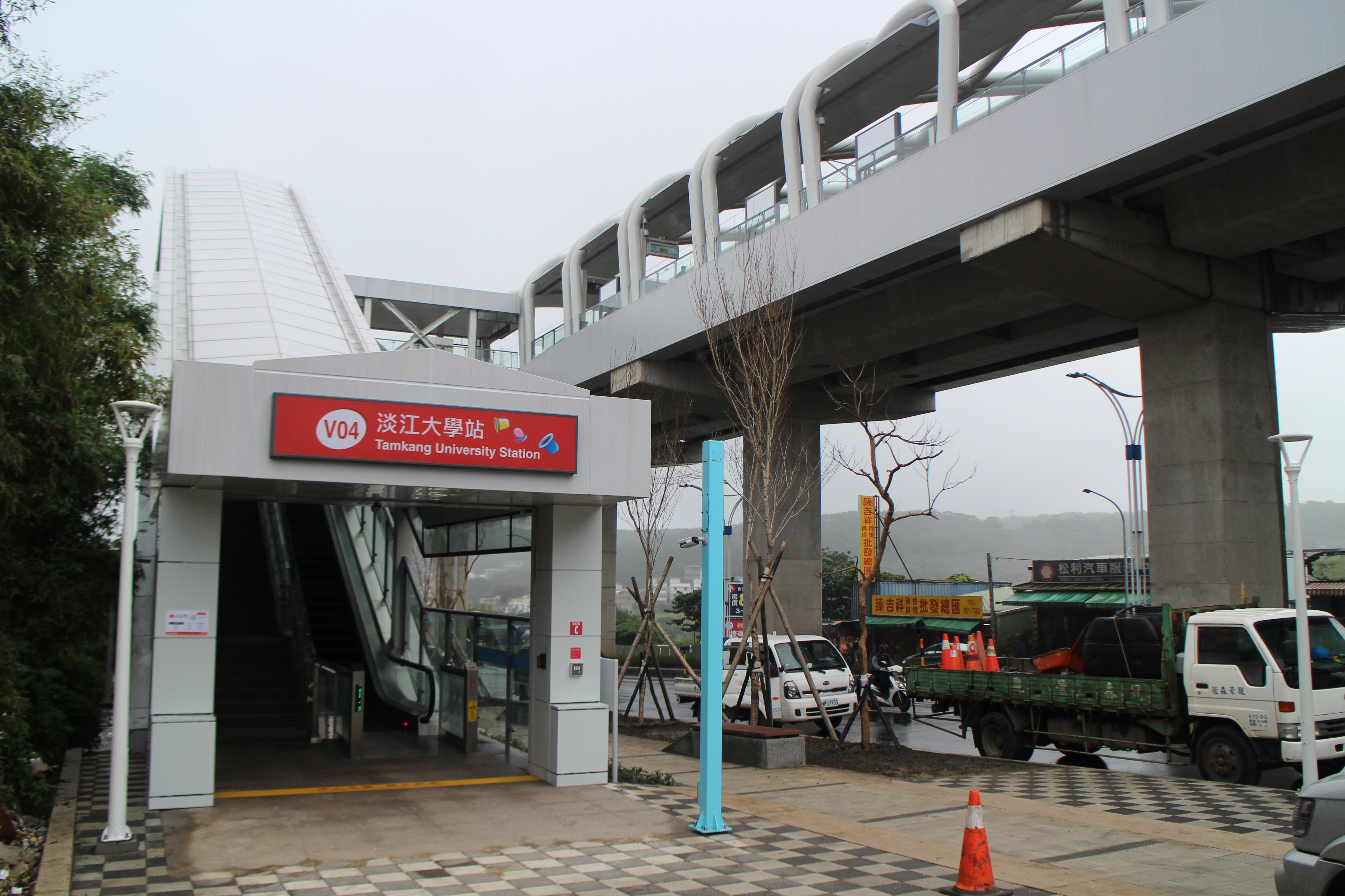 淡海輕軌淡江大學站出口。